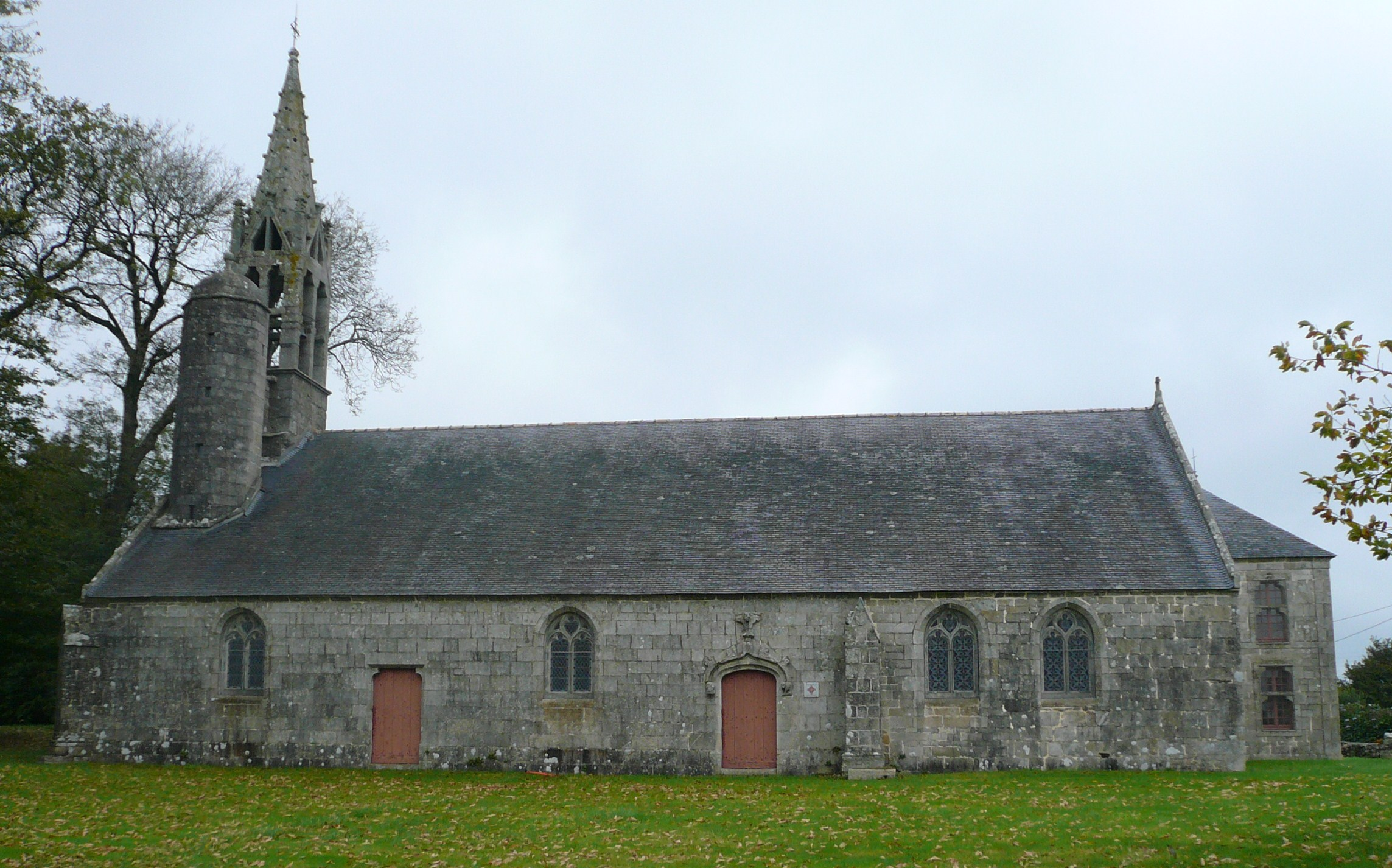 Vue d'ensemble de la chapelle de Coadry en Scaër, Finistère, Bretagne, France. Photo prise du sud. .